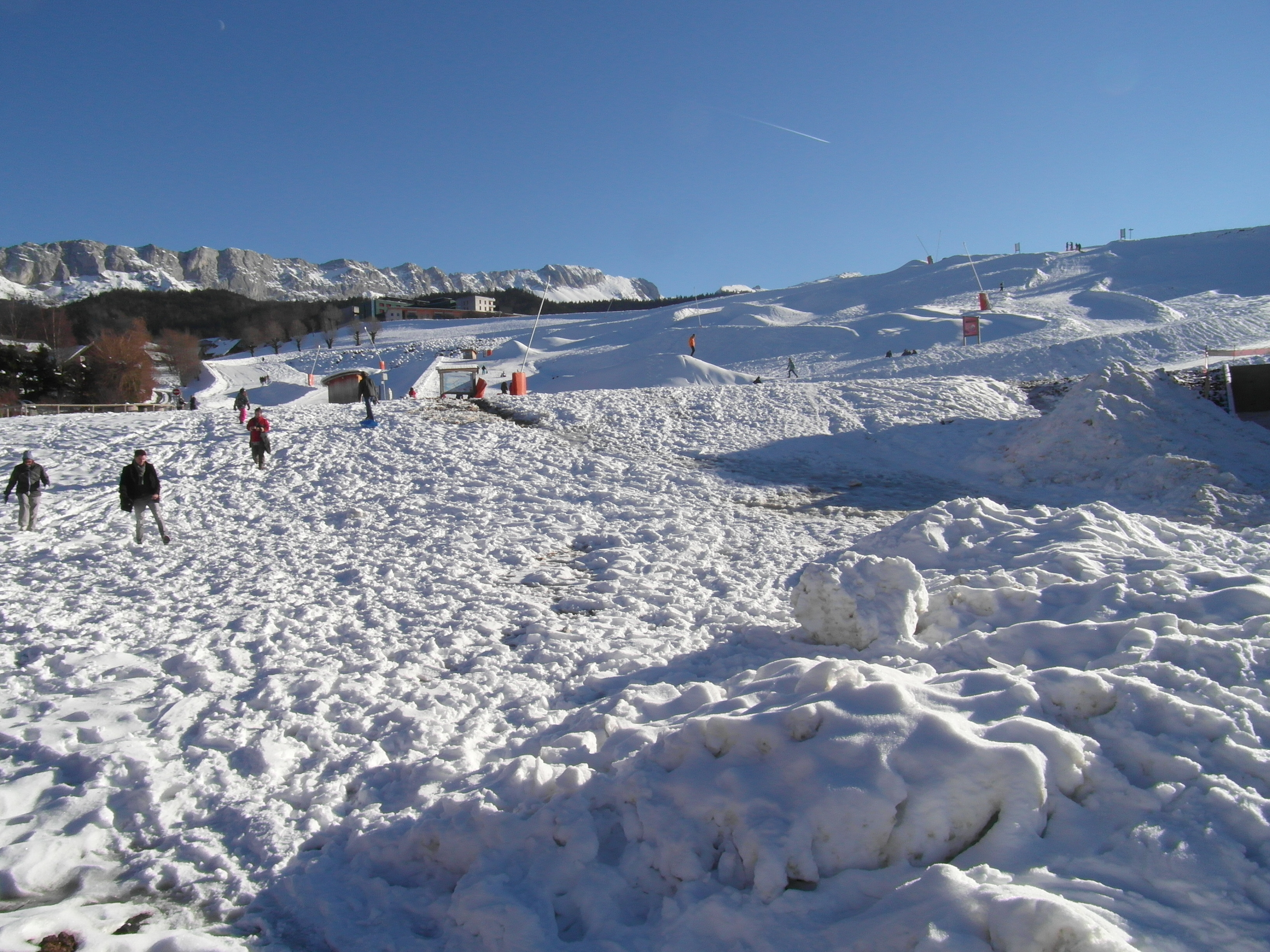 Colline des bains